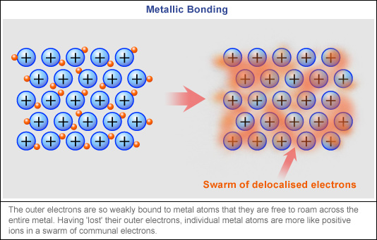 Positiboki kargatutako metal ioiak eta elektroi askeak sortutako elektroi itsasoa.